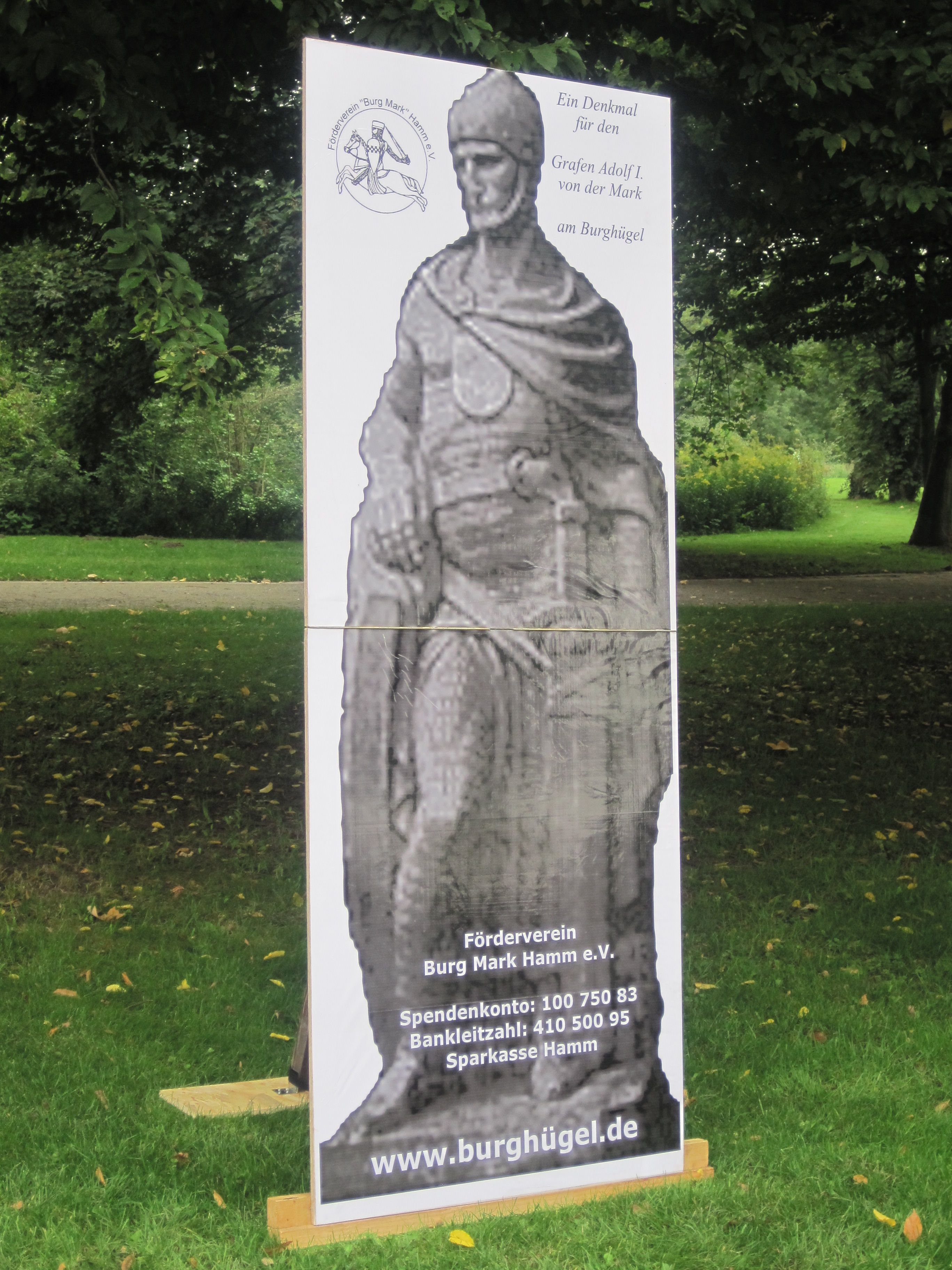 Dieses Foto zeigt eine Informationstafel des Fördervereins "Burg Mark" Hamm e.V., aufgestellt auf dem Burghügel Mark in Hamm anlässlich des "Tag des offenen Denkmals" am 12. September 2010. Sie zeigt die geplante Statue des Nagelgrafen zu Ehren des Hammer Stadtgründers Adolf I. Graf von der Mark nach dem Vorbild der historischen Figur von Leopold Fleischhacker.